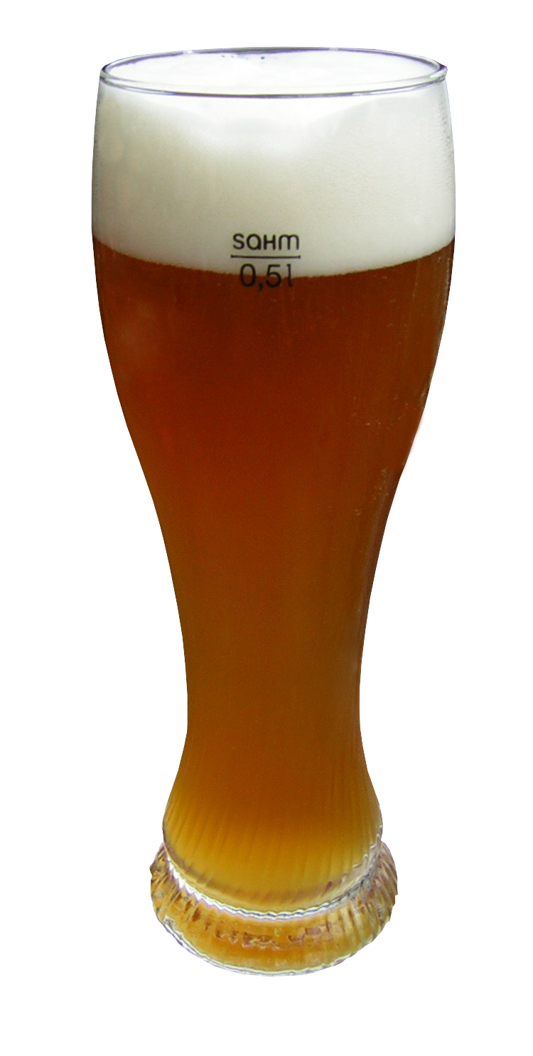 Weizenbier, Aufgenommen: 2005 mit Nikon Coolpix 2200